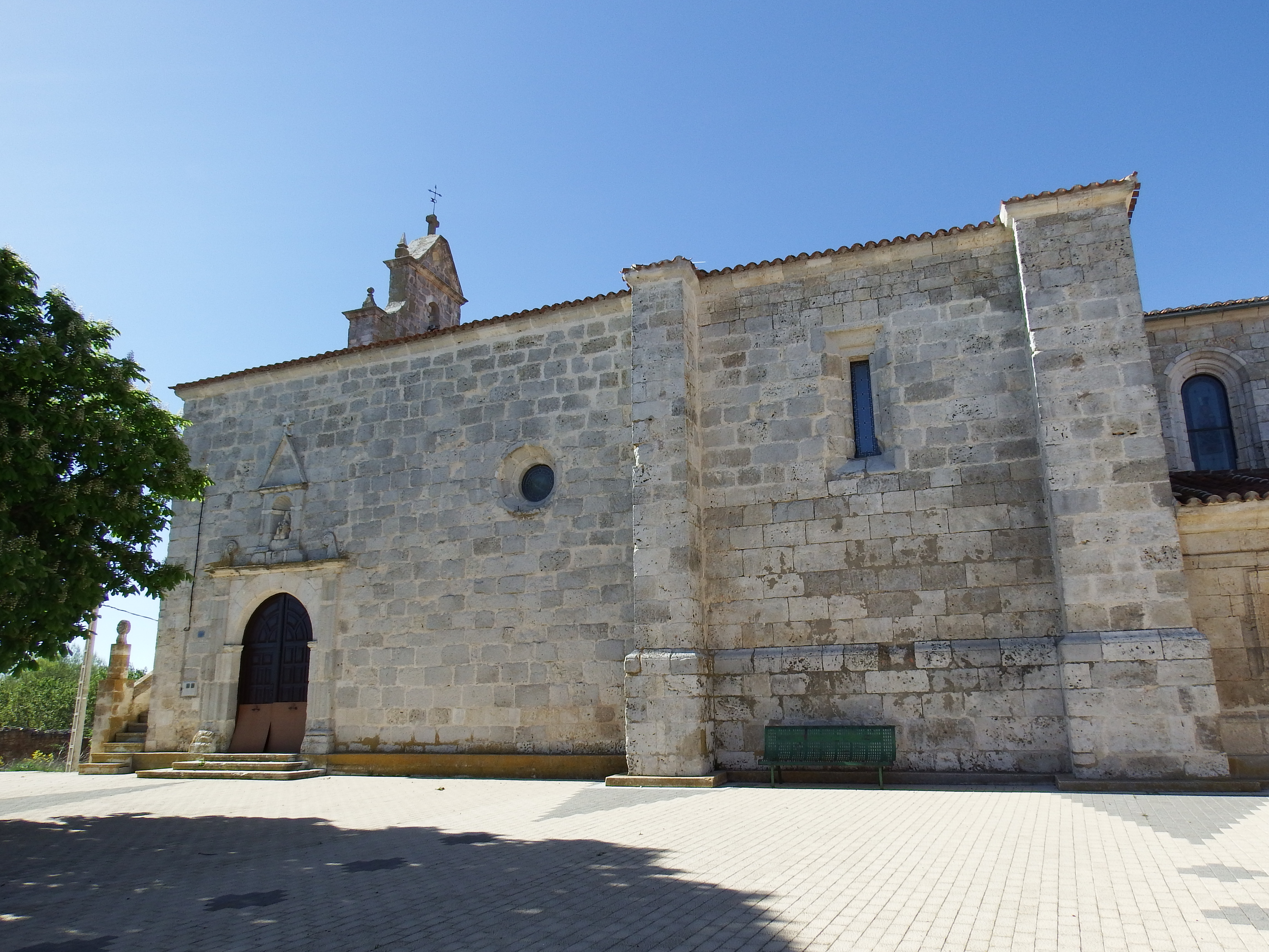 Iglesia de Santa María de la Torre